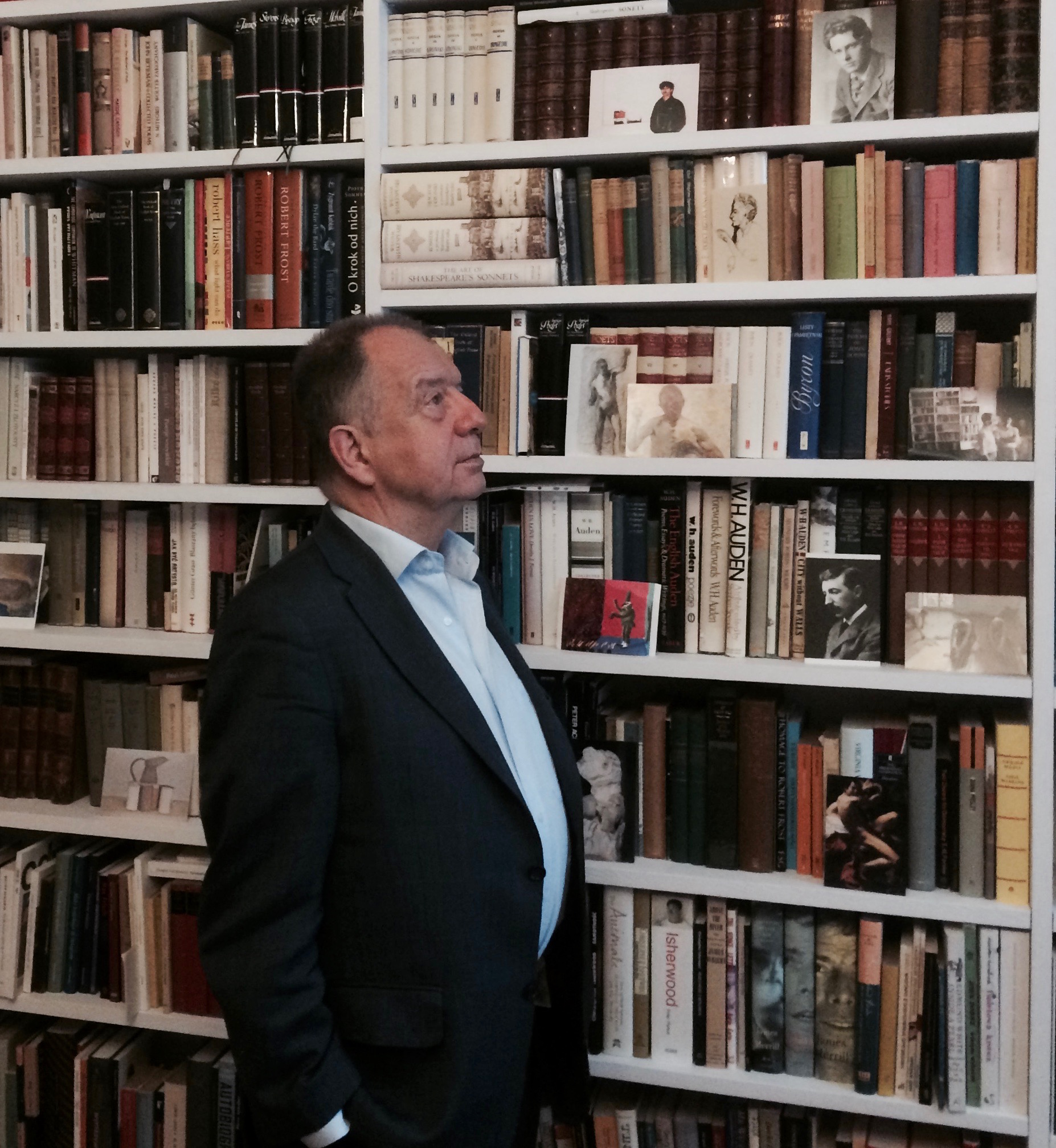 Wojciech Karpiński (pisarz), 2016